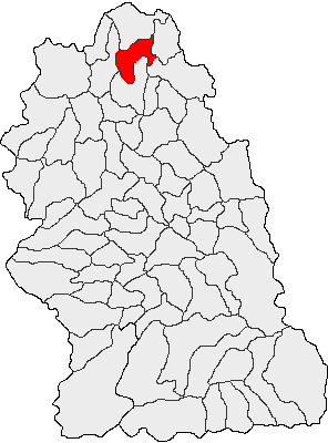 Categorie:Hărţi ale judeţului Hunedoara